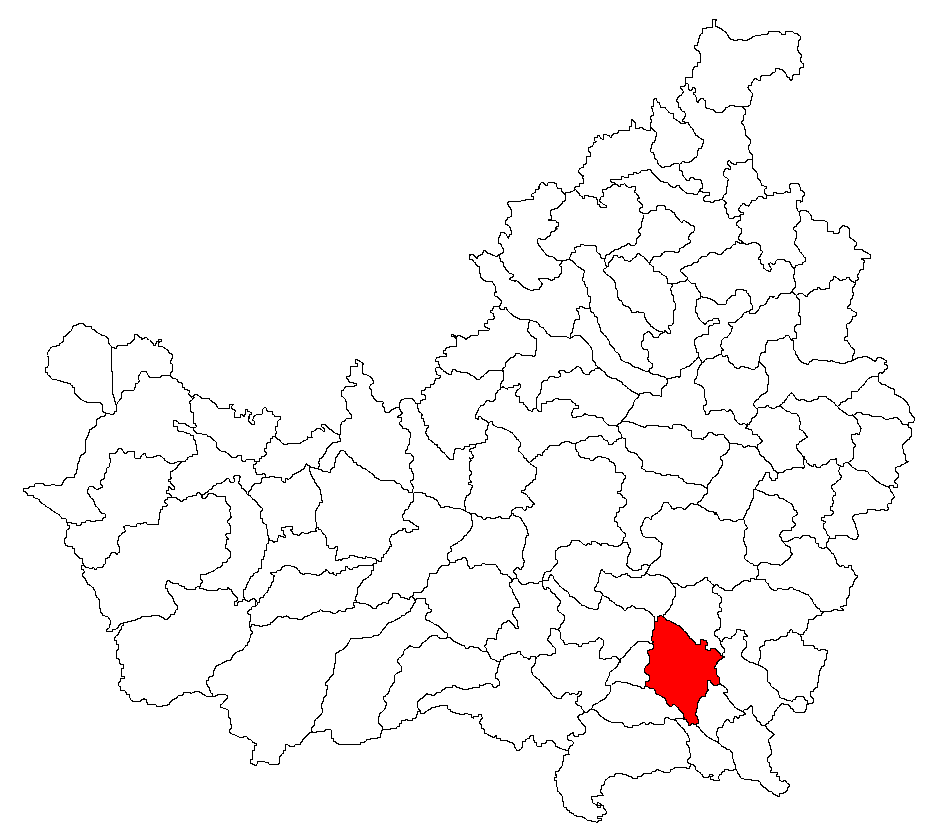 Categorie:Hărţi ale judeţului Cluj